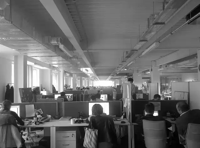 Фотография, сделанная в офисе российской компании "Ремблер" вечером 30 августа 2010 года.